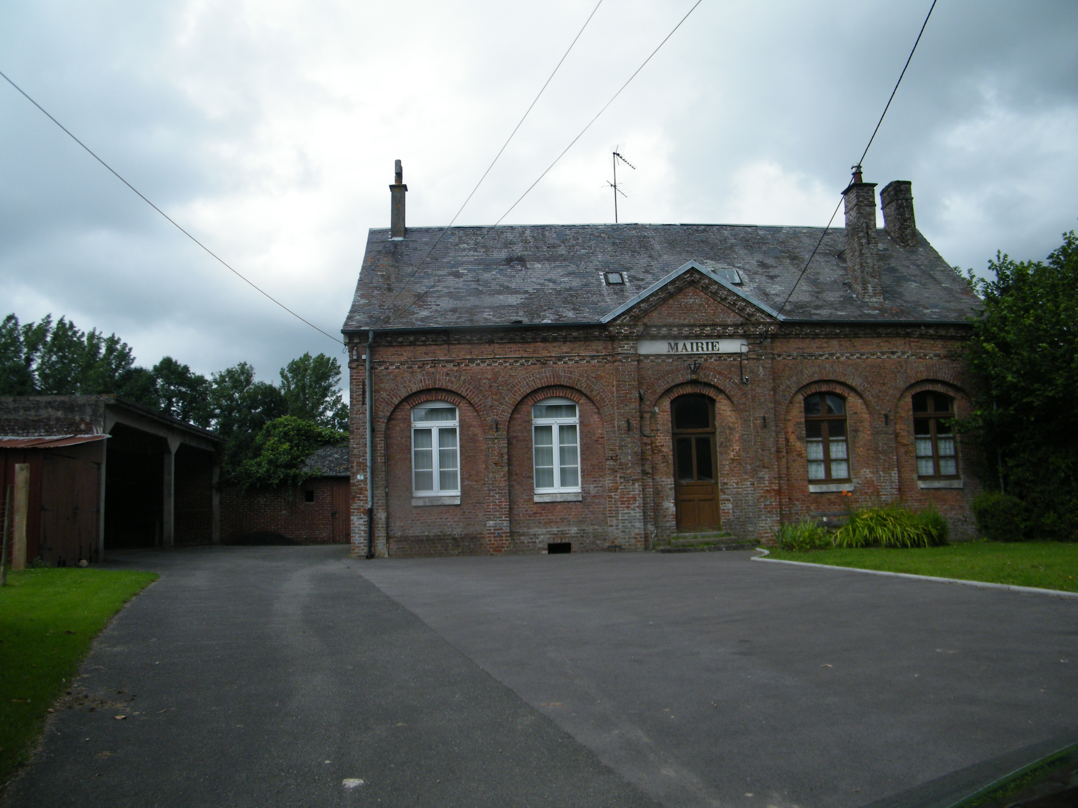 Mairie.